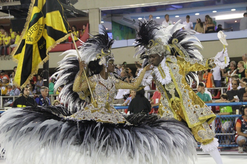 GRES São Clemente, 2012.